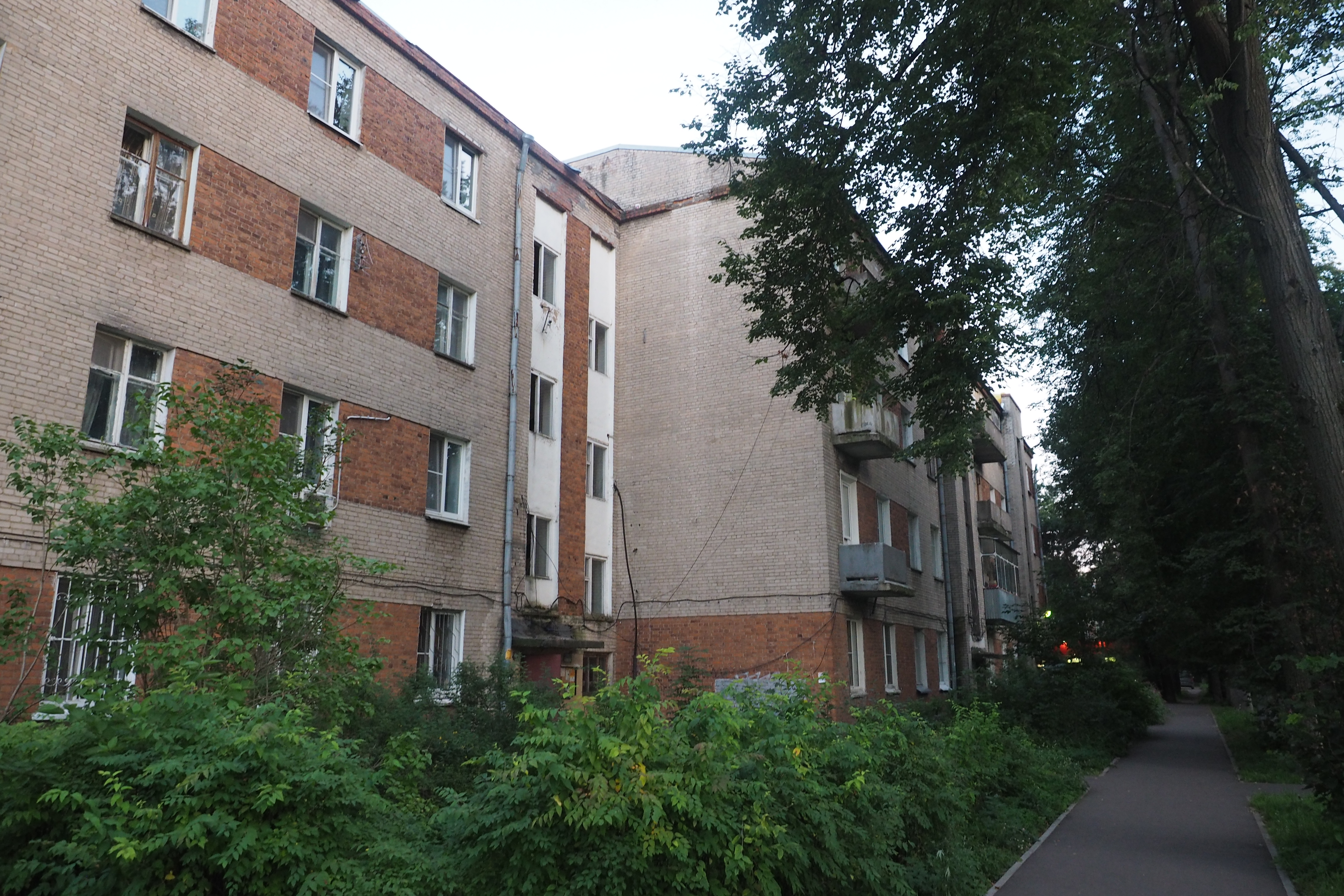 Посёлок Монино